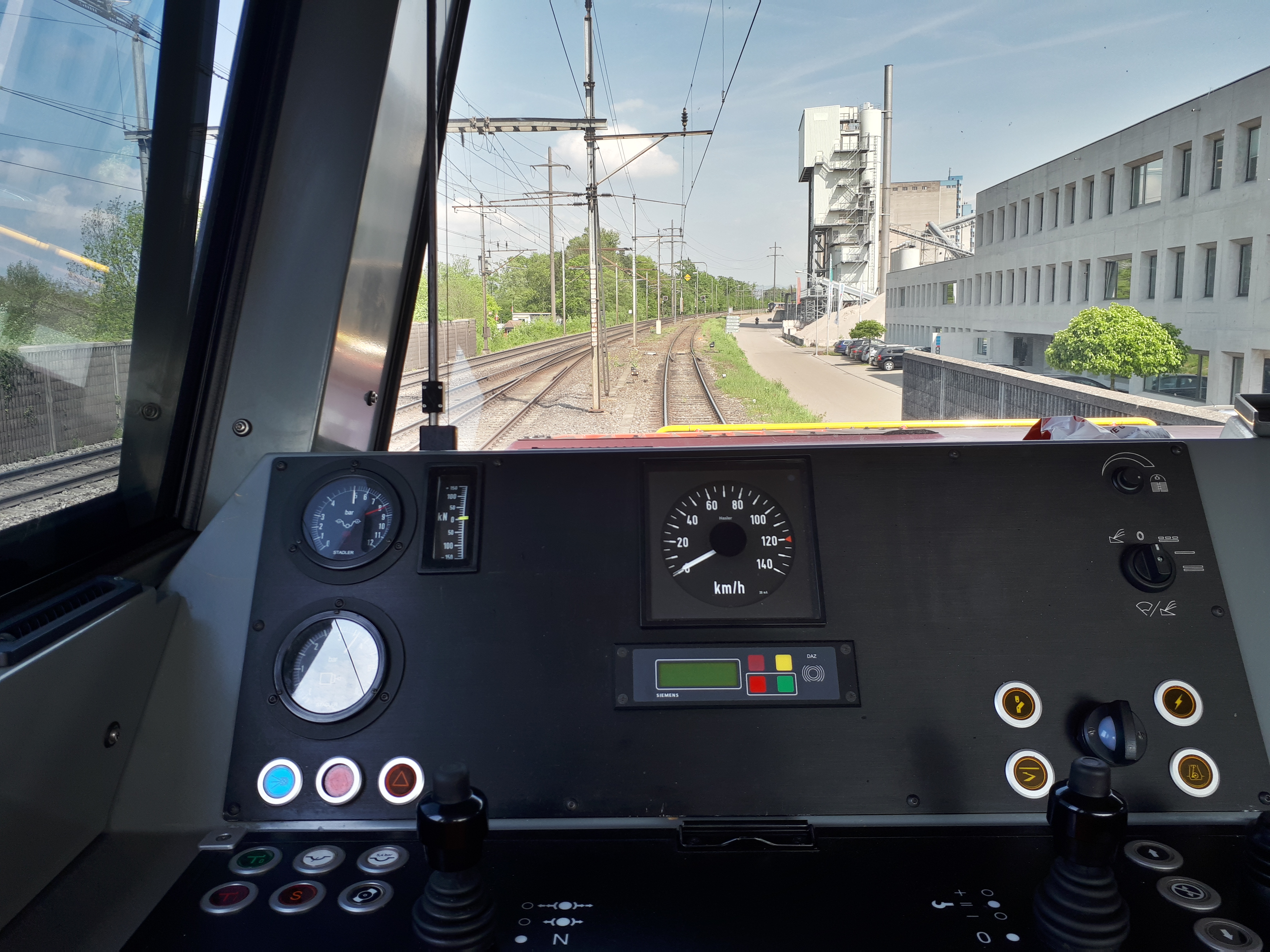 Der Führerstand einer Eem 923